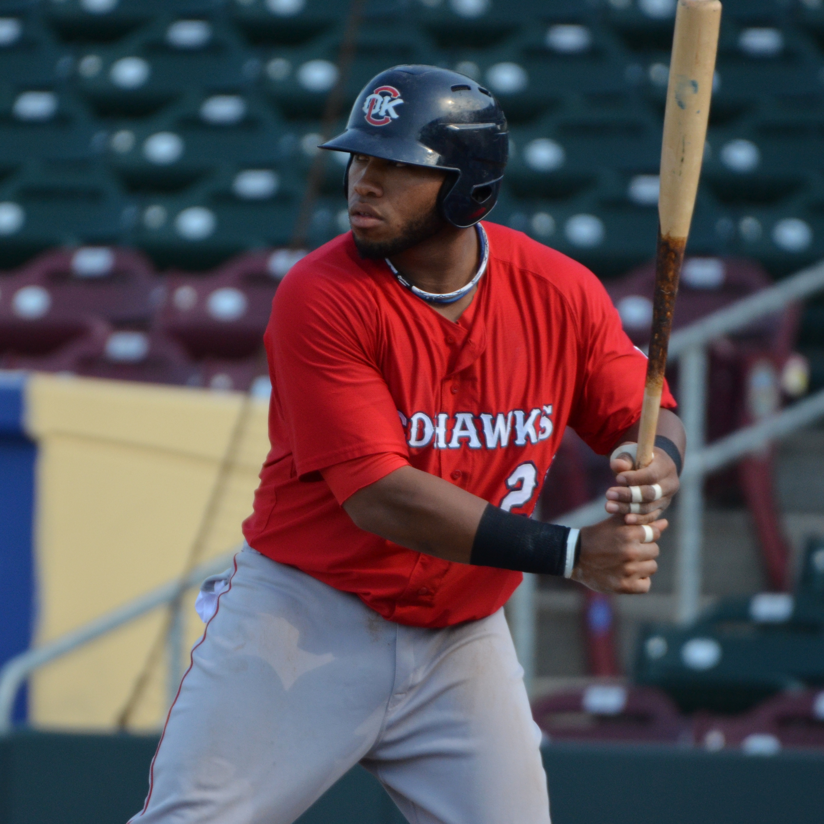 Jon Singleton